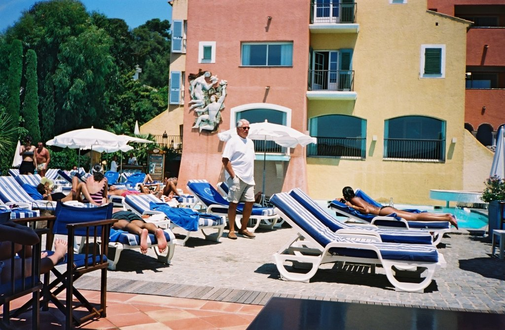 Piscine Hotel Byblos Saint Tropez